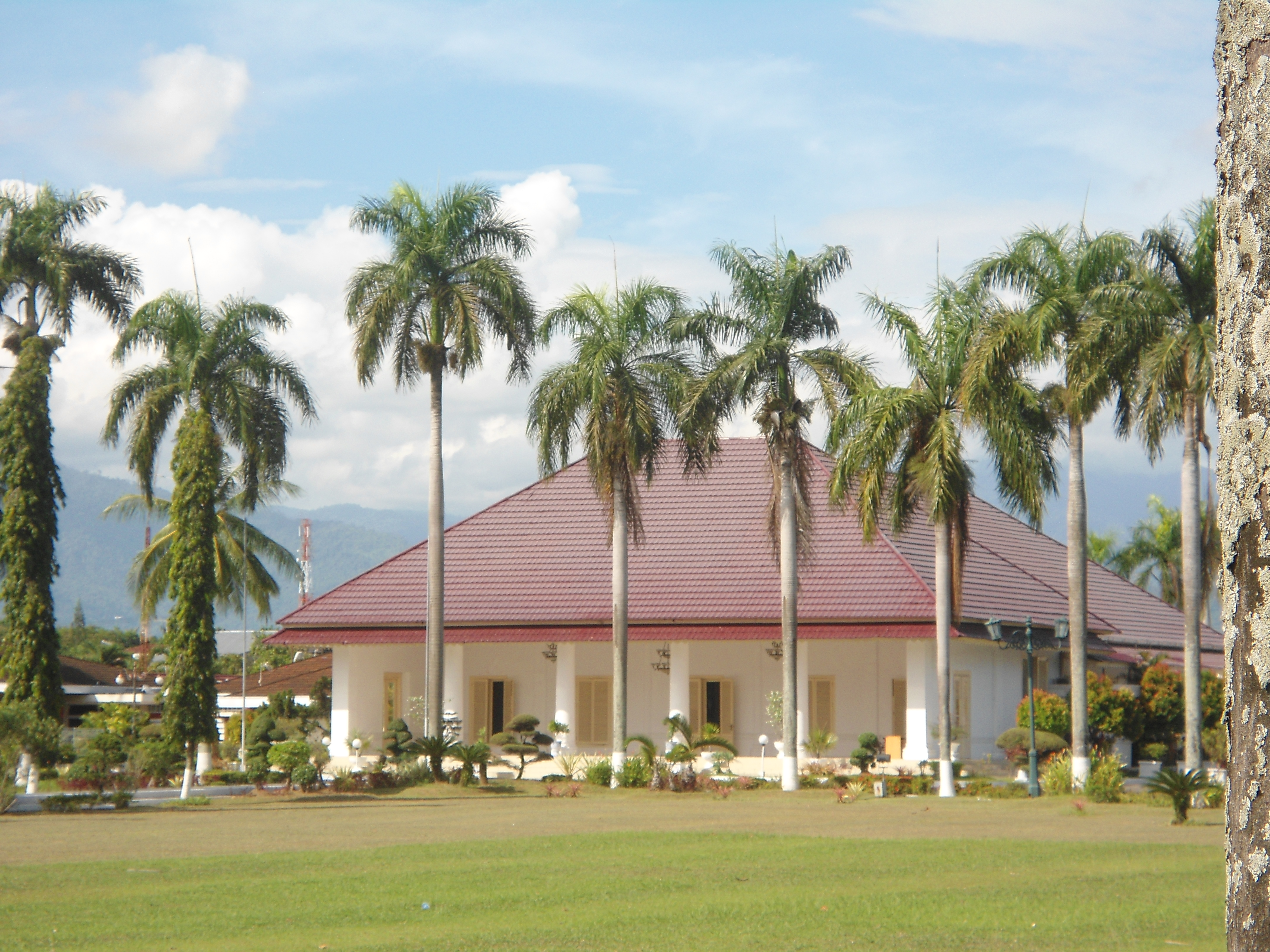 Rumah Gubernur Sumbar